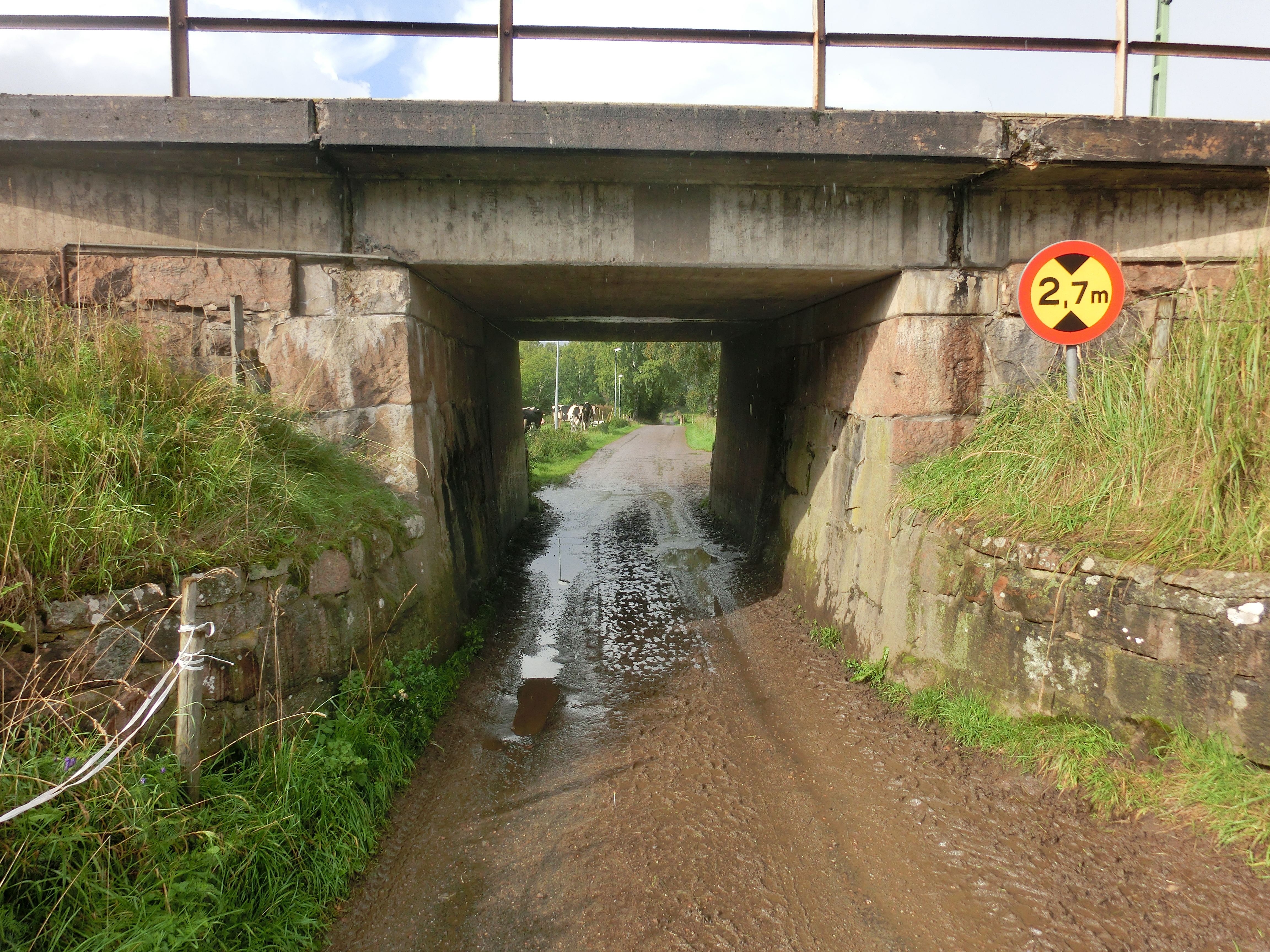 Järnvägsundergång under Västra stambanan vid Väsmestorp Östergården i Sörby socken, f.d. Vilske kommun, numer Falköpings kommun, f.d. Skaraborgs län, numer Västra Götalands län, Västergötland, Sverige, fotograferad 2017-09-14. Vägskylten till höger talar om att fri höjd endast är 2,7 meter. I bakgrunden ses svartvita kor av rasen Svensk låglandsboskap (SLB). I leran i undergången syns mängder av avtryck av kornas klövar.